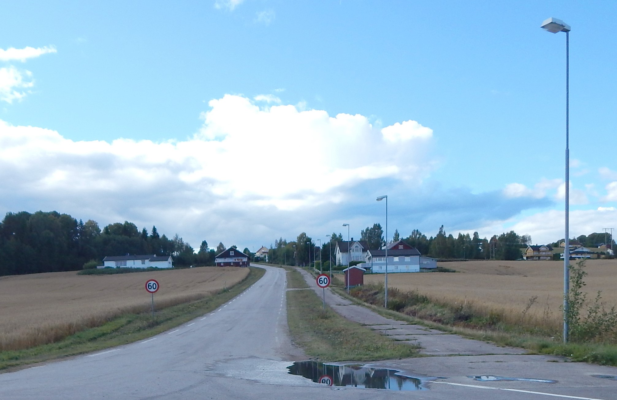 Risbergsvegen (fylkesvei 410) sett fra fylkesvei 210